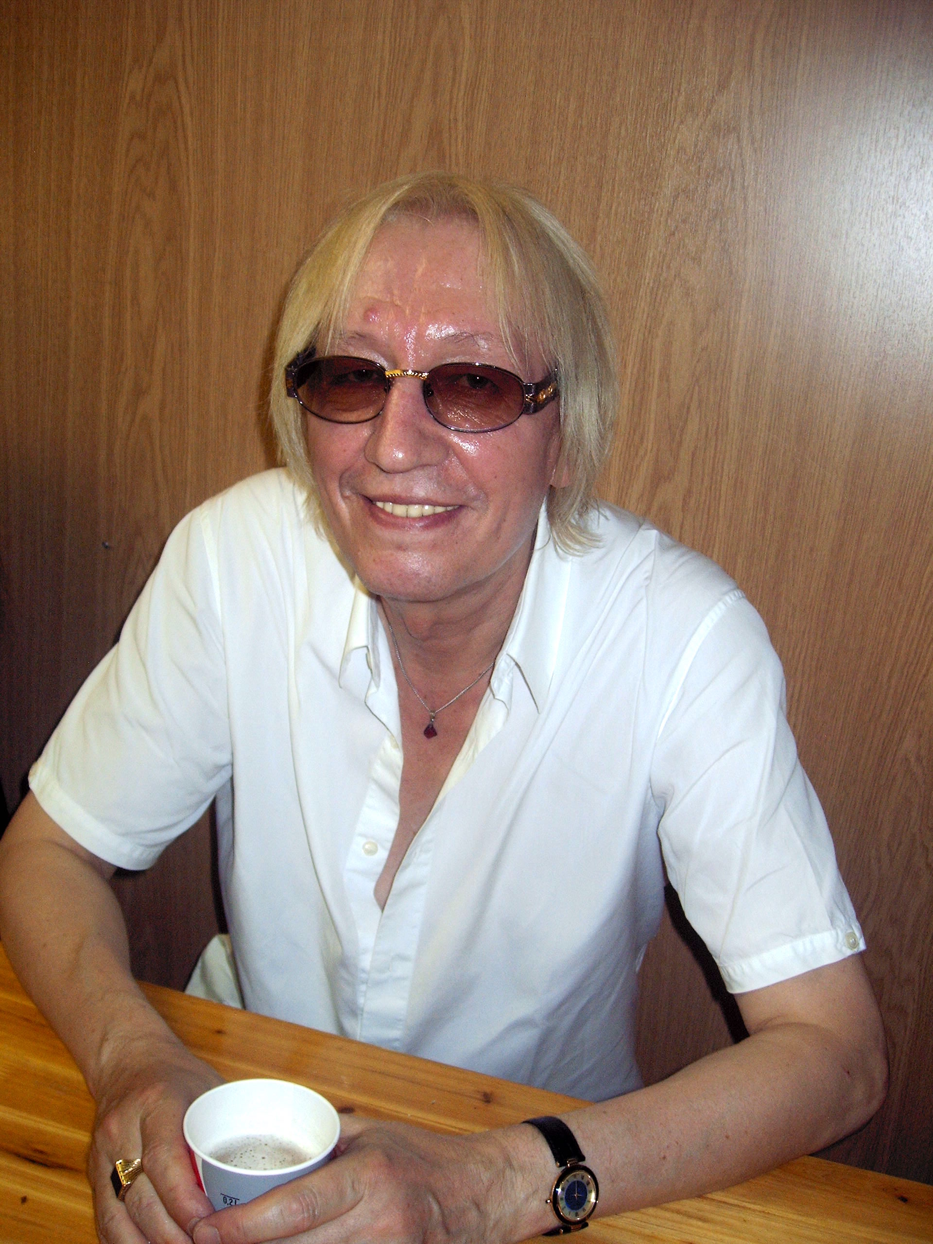 Ed Swillms backstage, Ost-Rock Klassik 2007 in Dresden